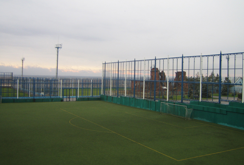 Учебно-тренировочная база «Ротор». Футбольные поля и руины командного пункта 138-й стрелковой дивизии.